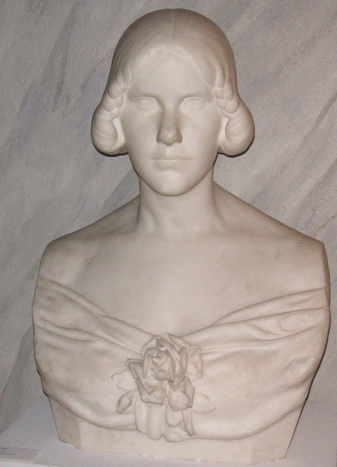 Ruth Milles byst av Jenny Lind, omkring 1915